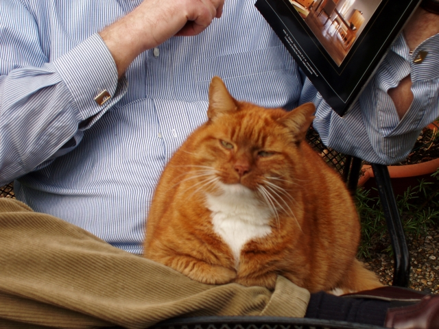 Eigen foto van mijn eigen kater " God de kater" geheten...